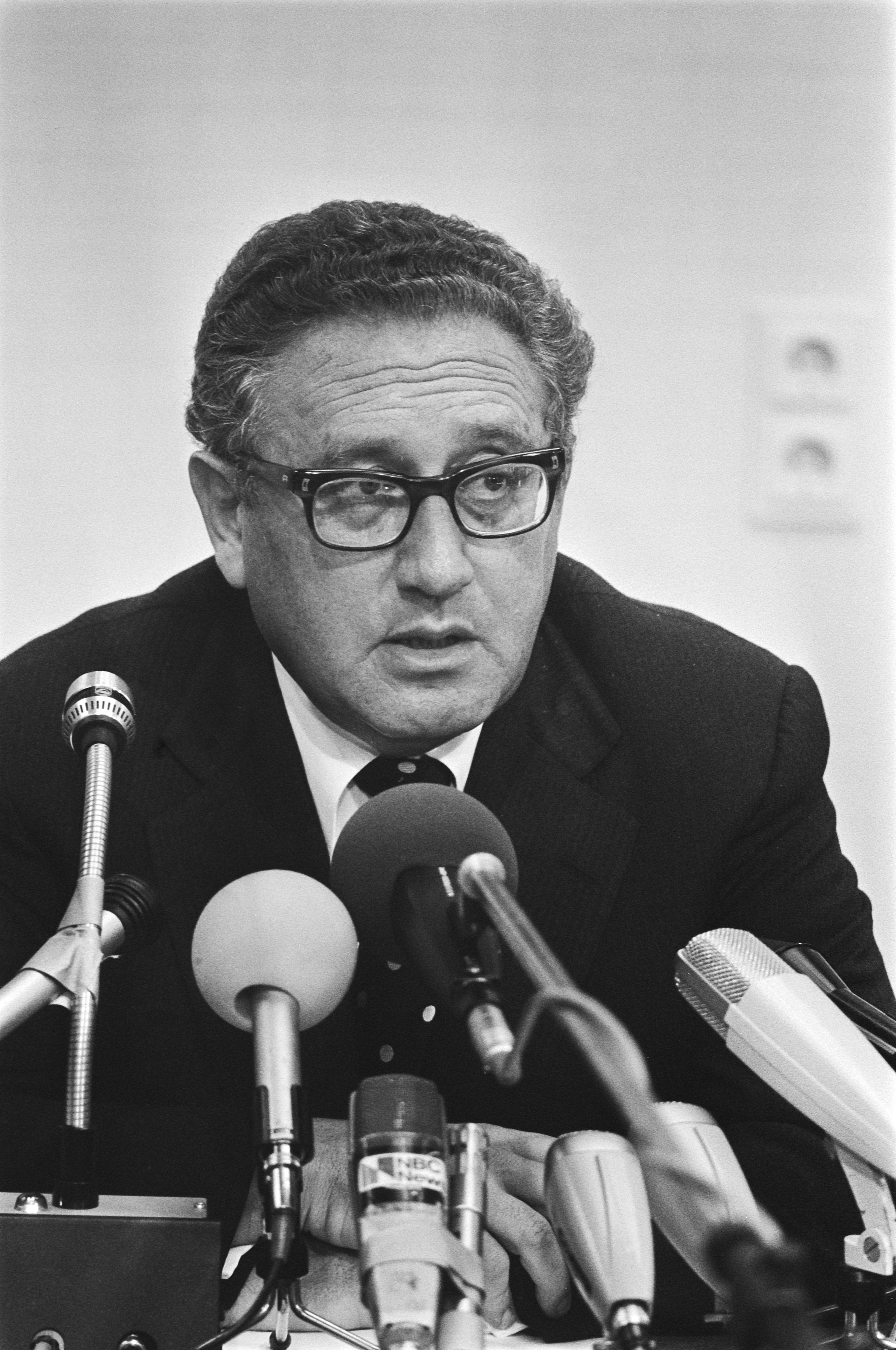 Collectie / Archief : Fotocollectie Anefo Reportage / Serie : [ onbekend ] Beschrijving : Amerikaanse Minister van Buitenlandse Zaken , dr. Henry Kissinger brengt bezoek aan Den Uyl op Catshuis, Kissinger, kop Datum : 11 augustus 1976 Trefwoorden : ministers Persoonsnaam : Dr. Henry Kissinger, Uyl, Joop den Fotograaf : Verhoeff, Bert / Anefo Auteursrechthebbende : Nationaal Archief Materiaalsoort : Negatief (zwart/wit) Nummer archiefinventaris : bekijk toegang 2.24.01.05 Bestanddeelnummer : 928-7267